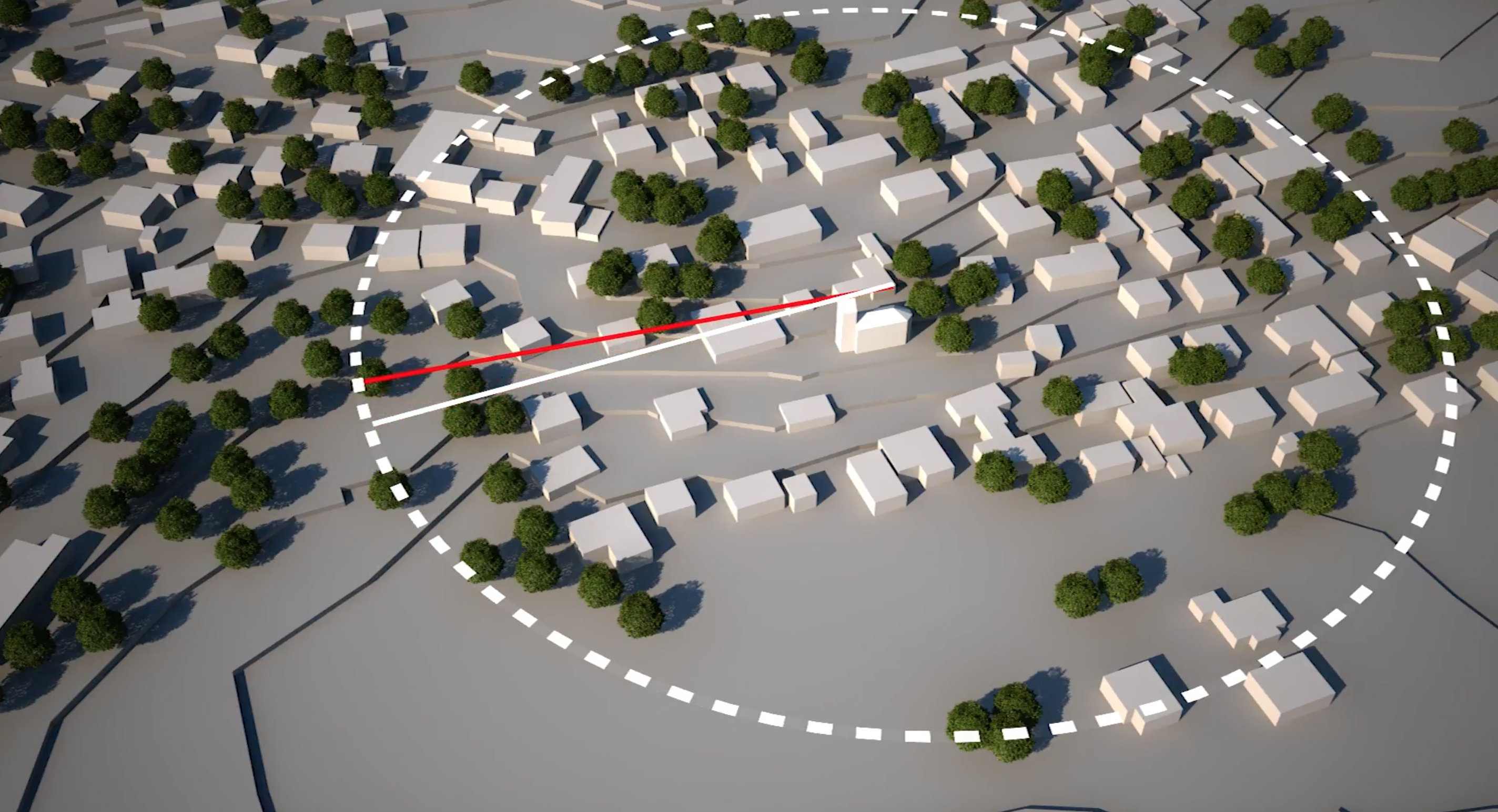 Dieses Bild zeigt die Definition der Lage des Altars von St. Benedikt. 164 Meter vom Altar St. Martins entfernt und um "heilige sieben Grad" nach Norden verdreht.